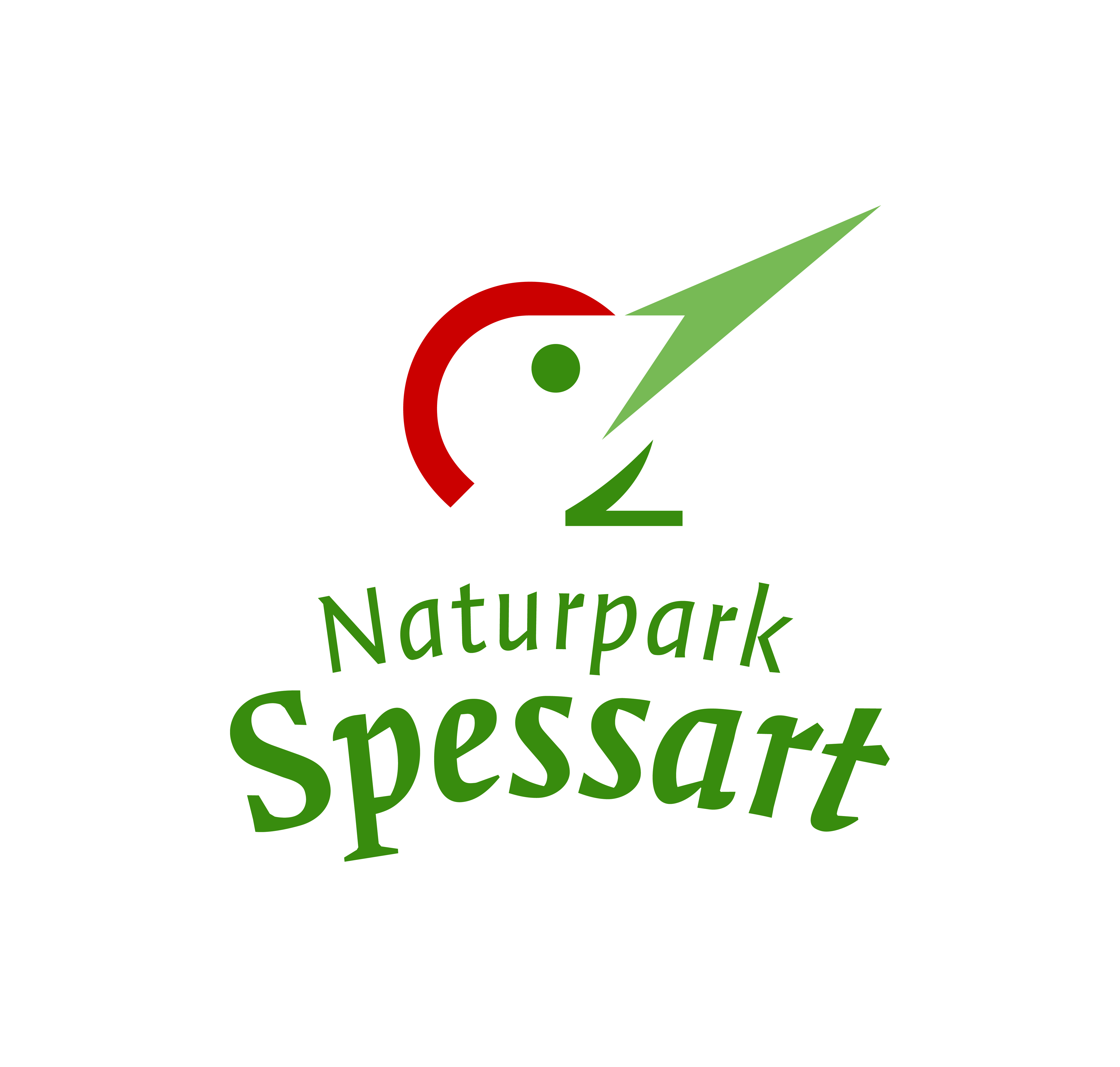 Vereinslogo des bayerischen Teils des Naturpark Spessart.